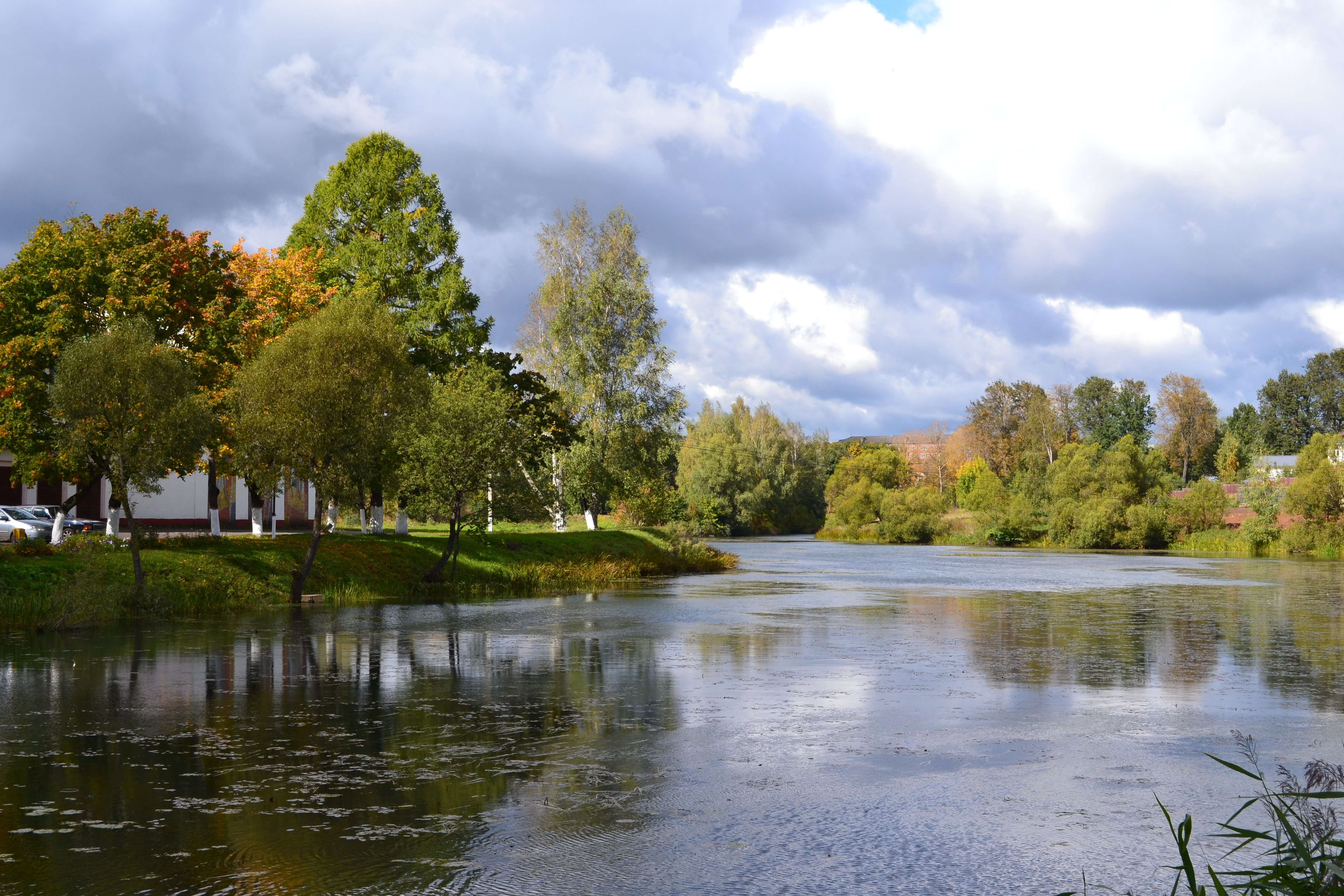 Река Горелый крест в Струнино